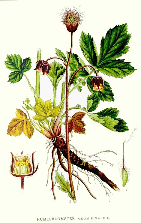 Geum rivale L. Original Description Humleblomster, Geum rivale L.